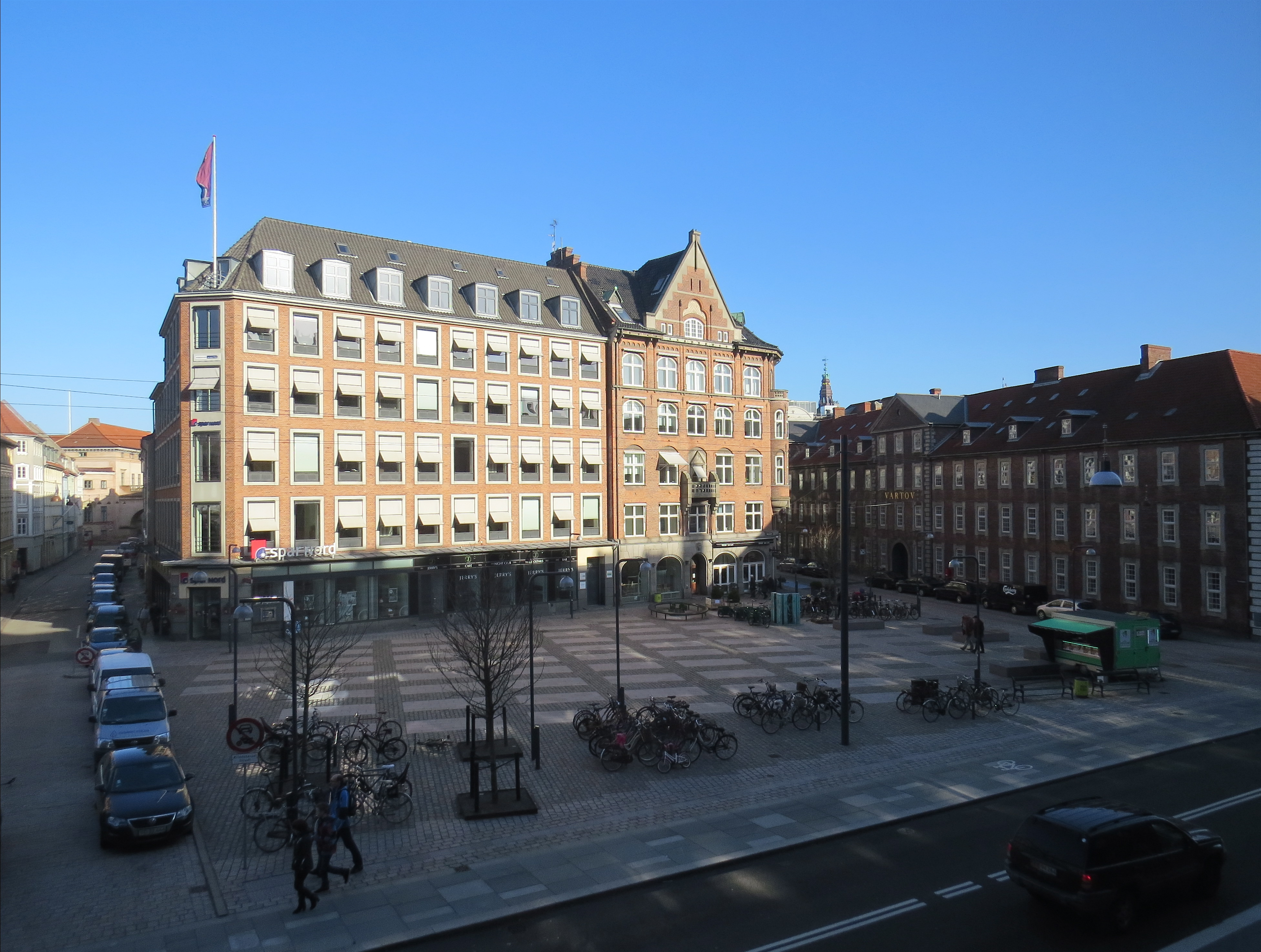 Regnbuepladsen, København